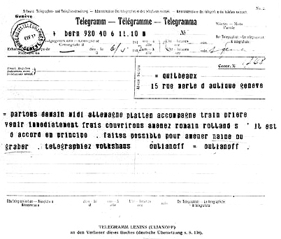 Telegramm von Lenin an Henri Guilbeaux 6. April 1917. Siehe Henri Guilbeaux} Text: partons demain midi allemagne platten accompagne train priere venir immediatement frais couvrirons amenez romain rolland s'il est d'accord en principe. faites possible pour amener naine ou graber. telegraphiez volkshaus oulianoff Personen: Charles Naine; Ernest-Paul Graber; Romain Rolland